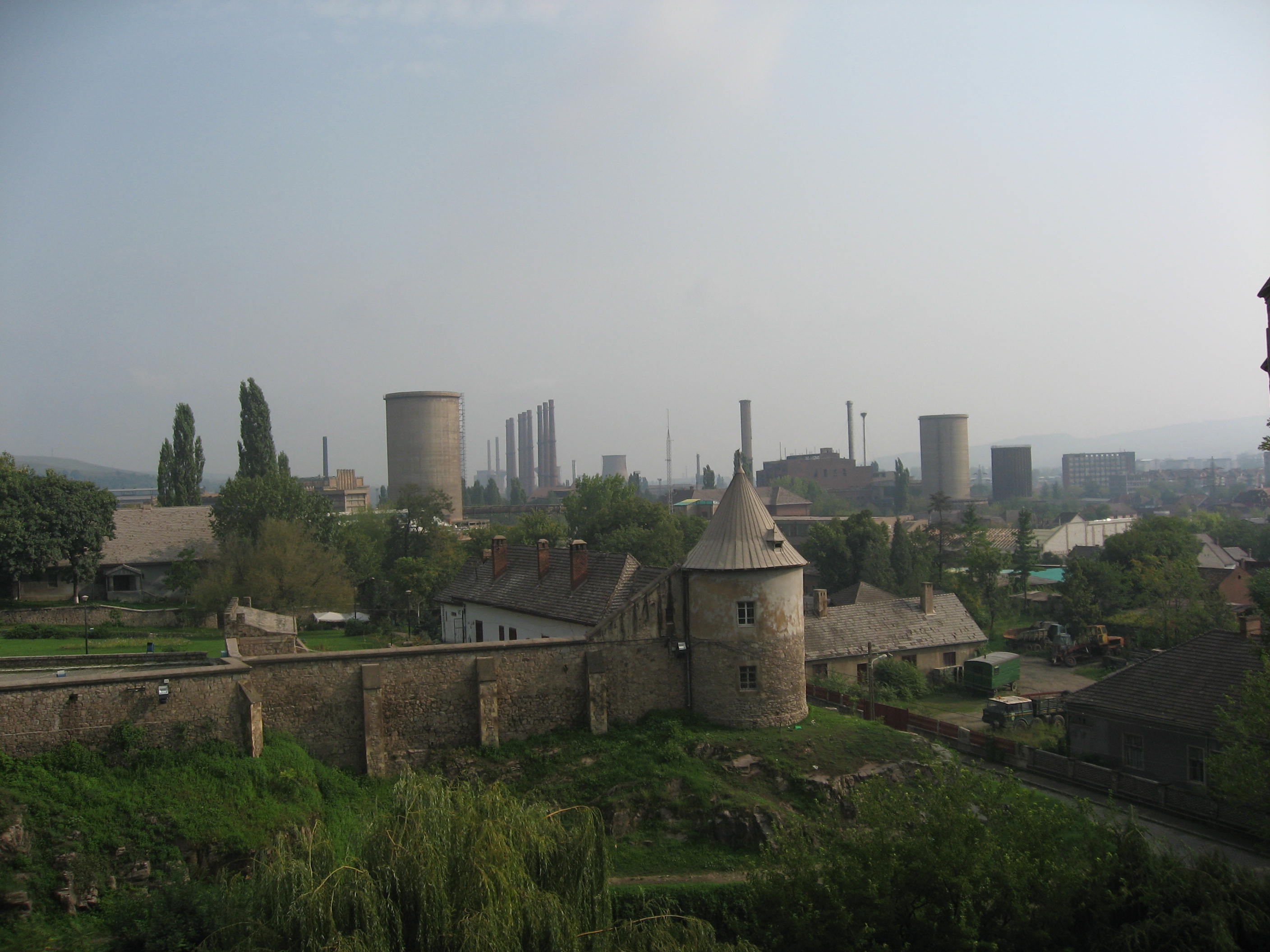 Hunedoara